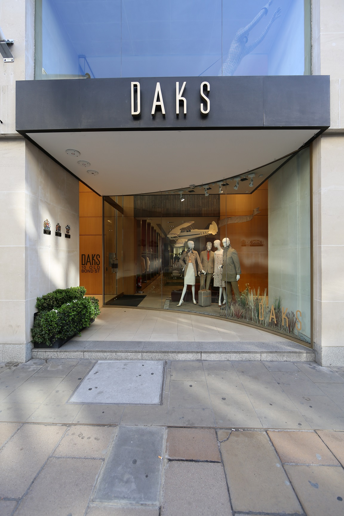 DAKS Old Bond Street, 10 Old Bond Street London W1S 4PL ( April, 24th, 2013)